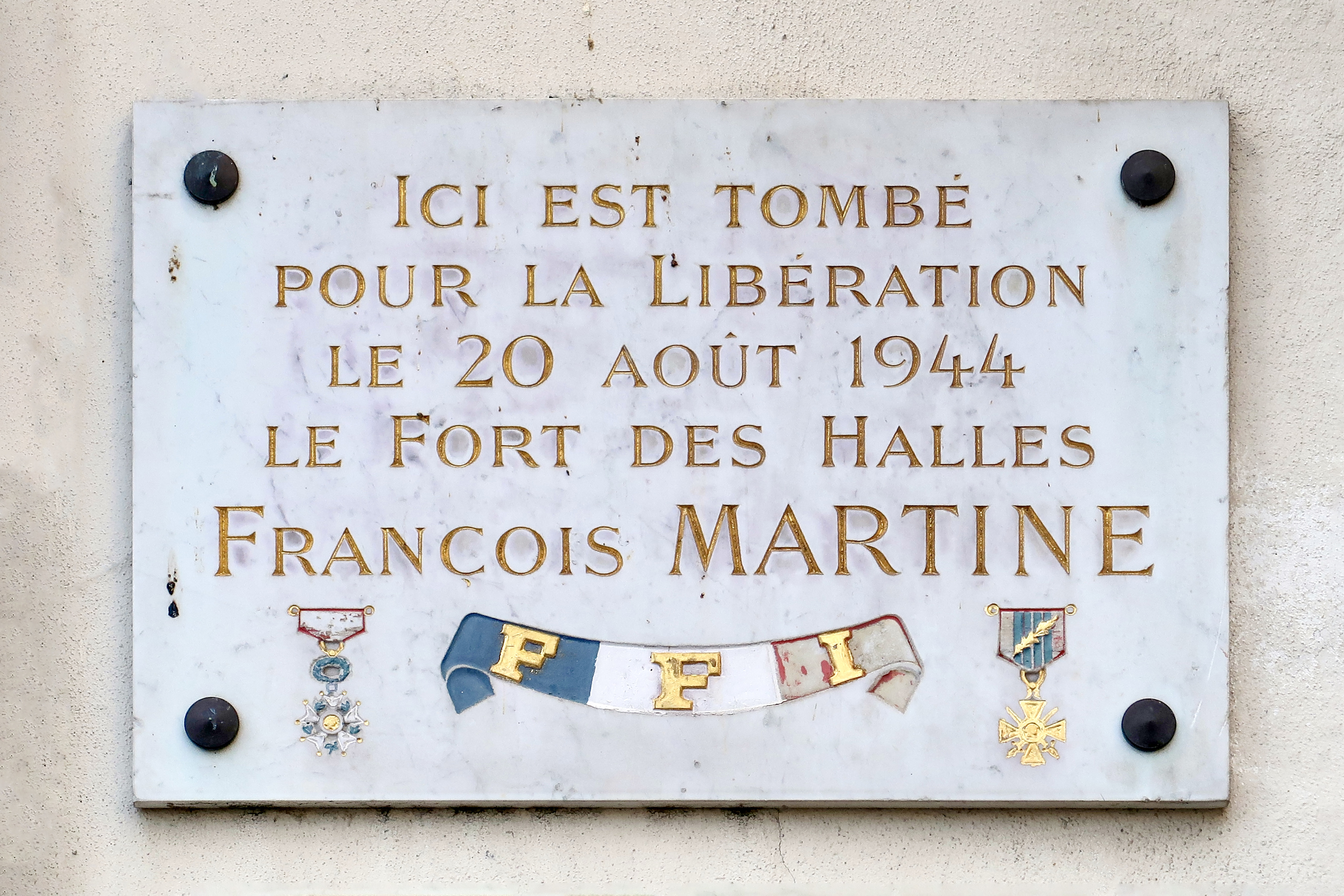 Plaque en hommage au résistant François Martine, n°1 rue du Jour (Paris, 1er).